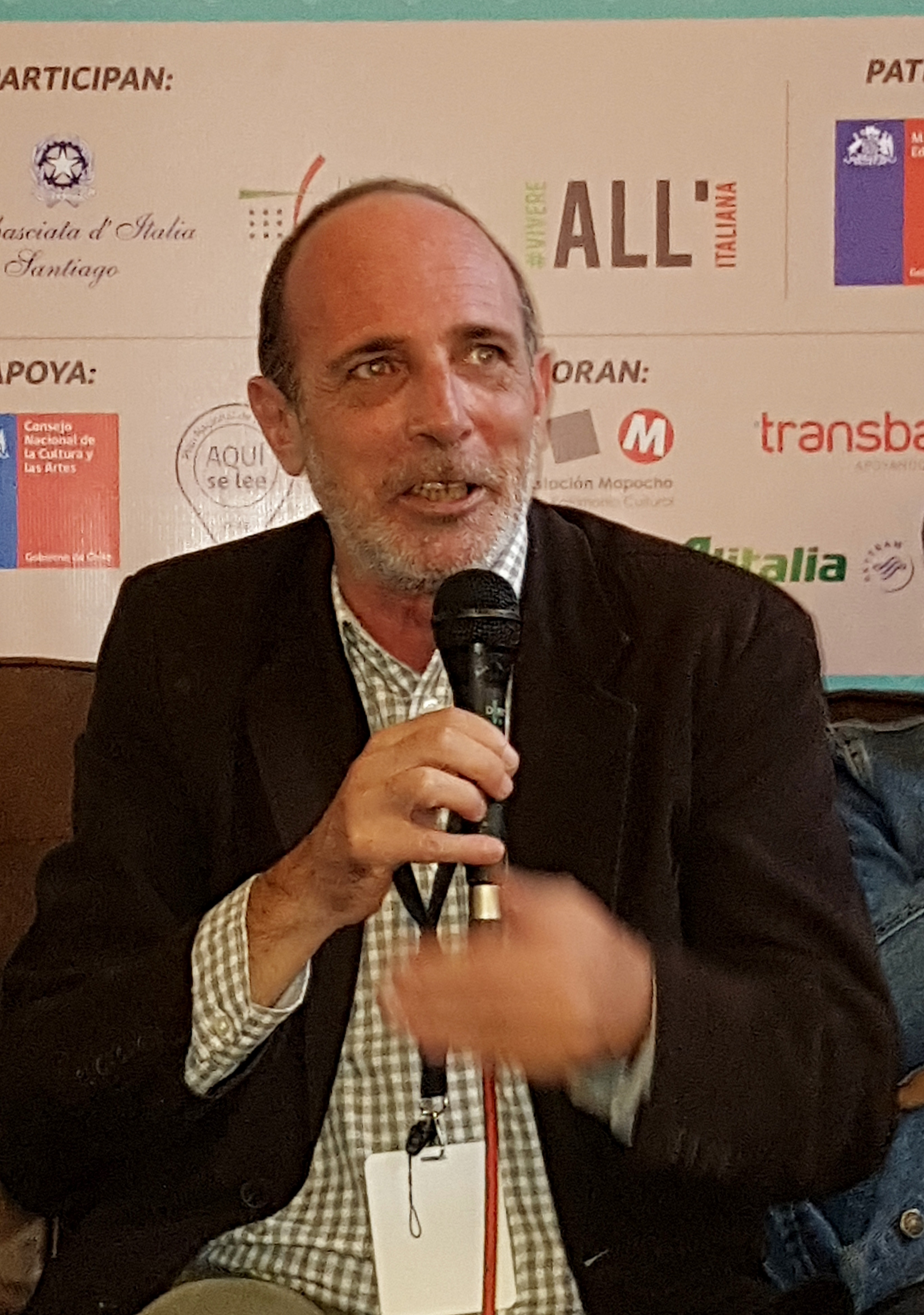 El poeta italiano Antonio Nazzaro en la Feria Internacional del Libro de Santiago 2017.